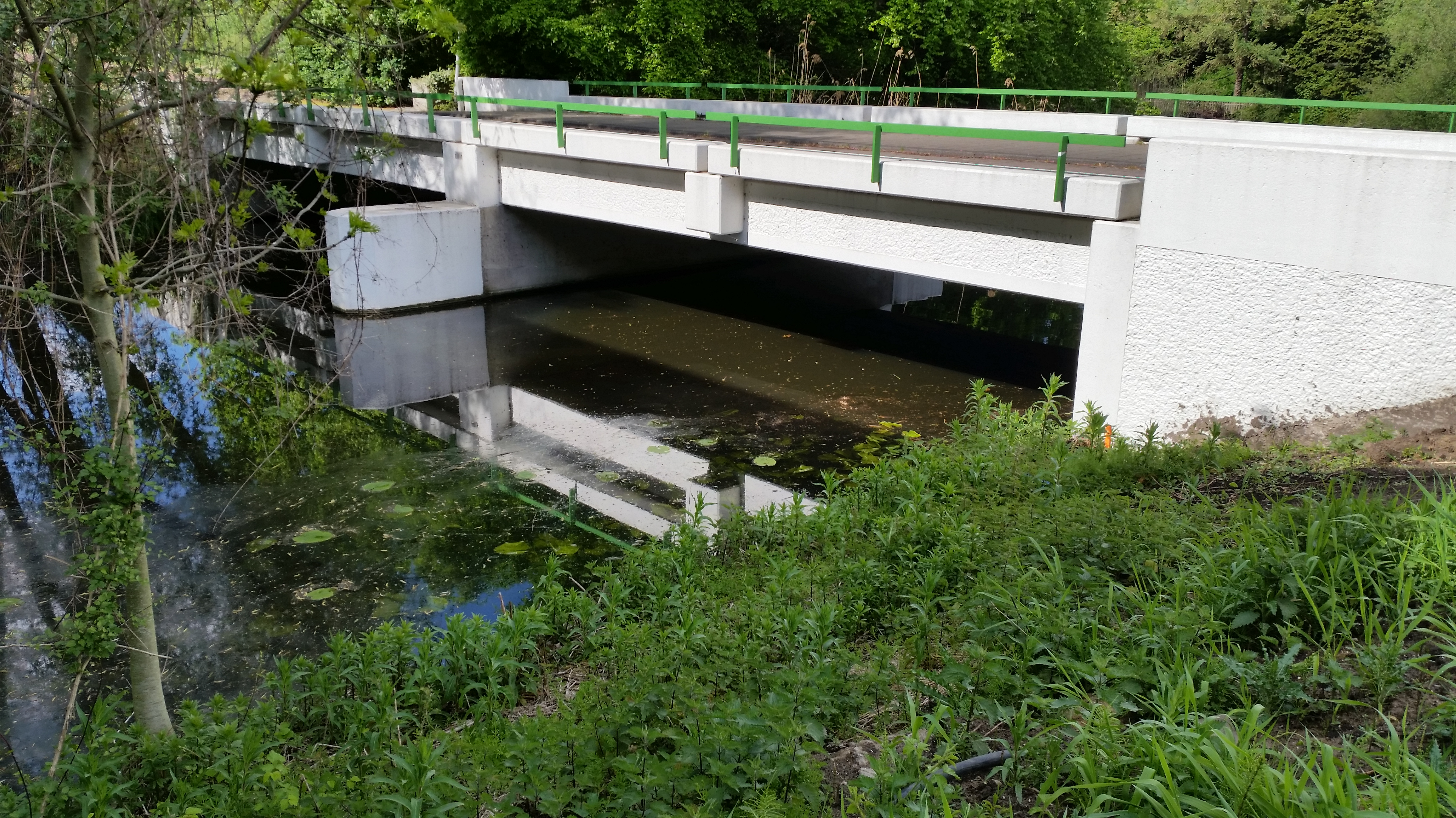 Zijaanzicht van Brug 870 (in Amsterdam)